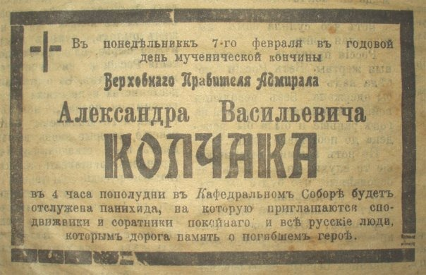 Объявление в газете о панихиде 7 февраля 1921 года.